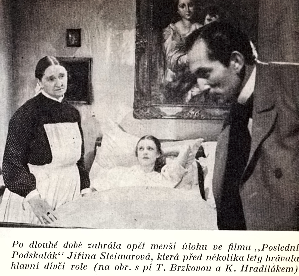 Jiřina Steimarová (uprostřed) ve filmu "Poslední Podskalák" (1940)